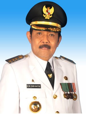 Wali Kota Papepare 2008–13, Zain Katoe